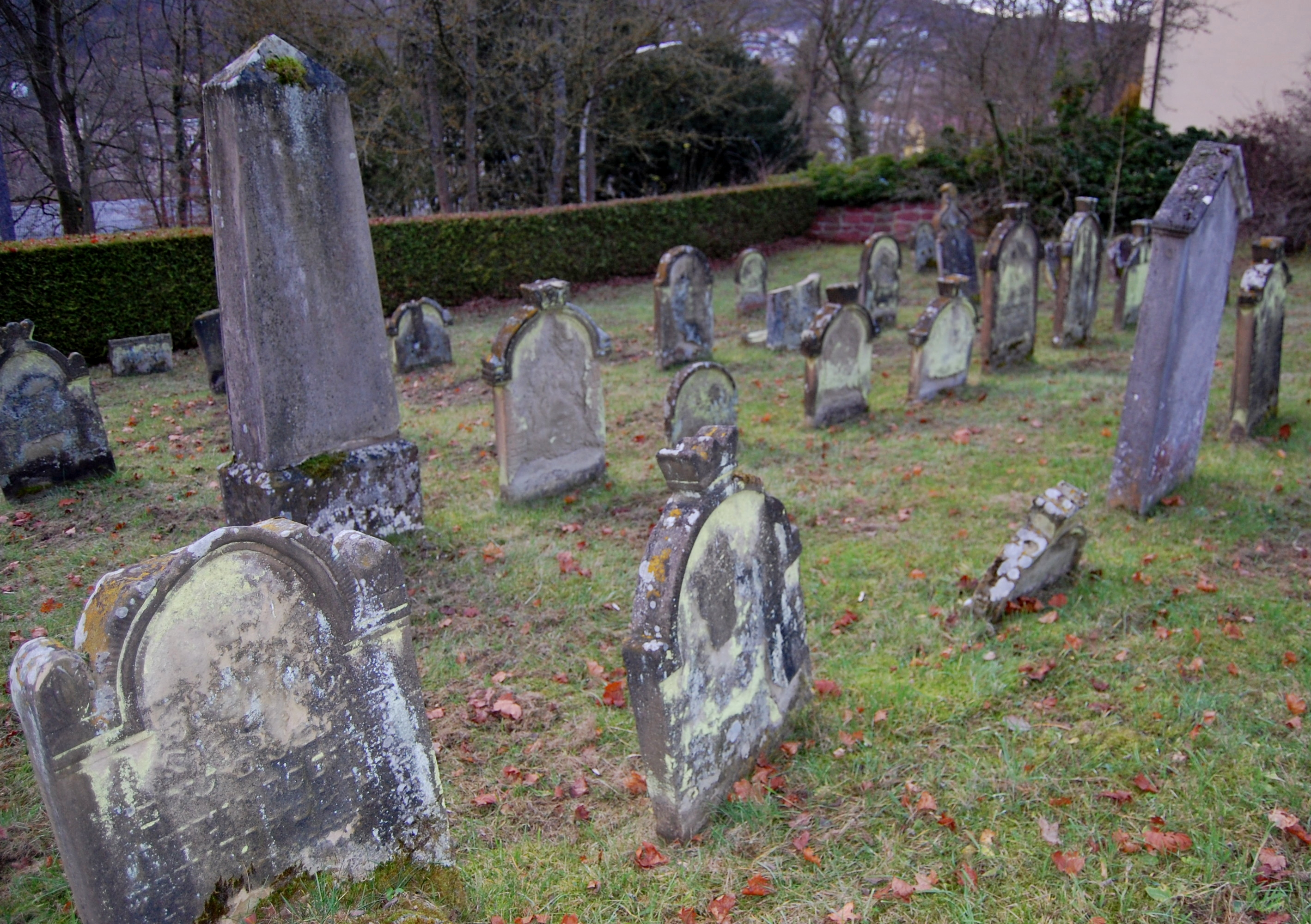 Ältester Abschnitt auf dem Jüdischen Friedhof Bad Kissingen